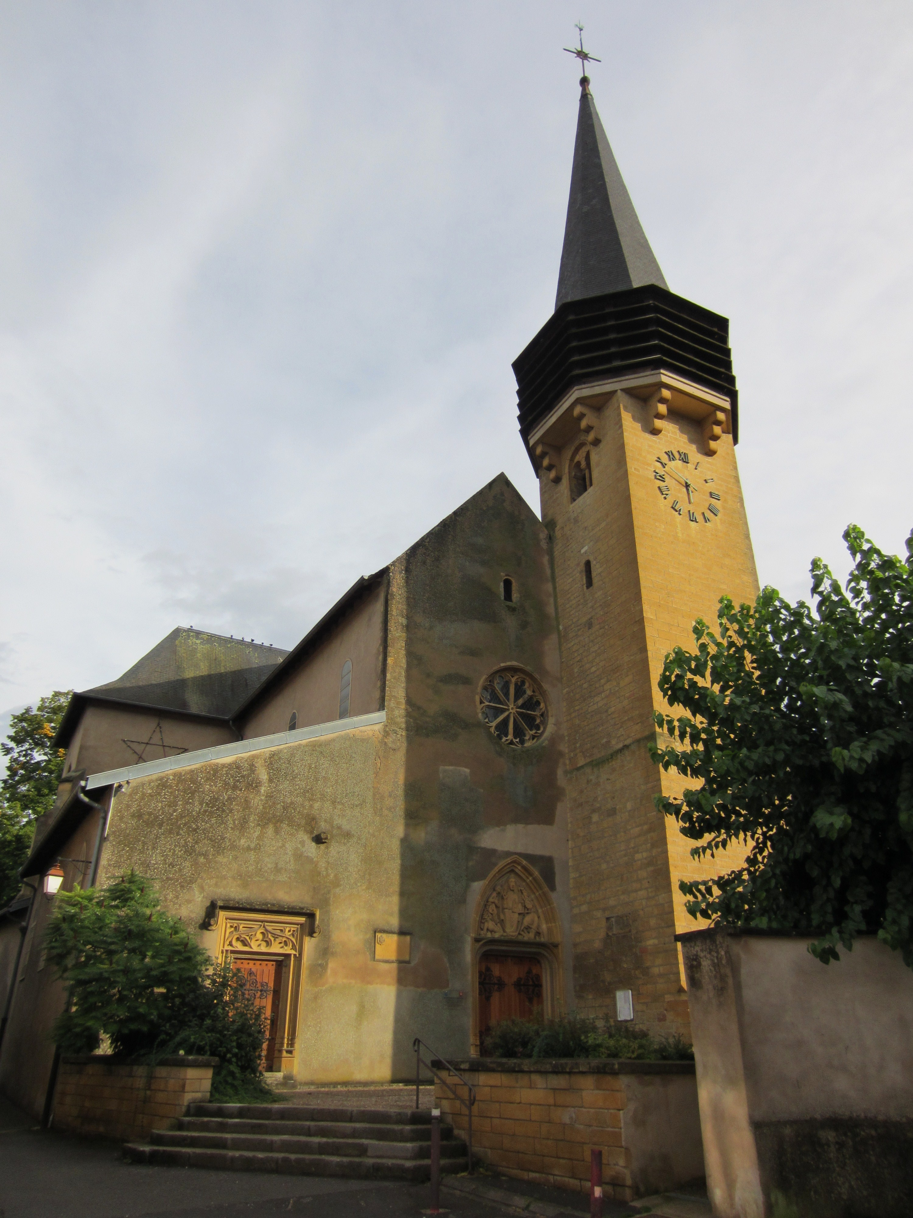 Description eglise Notre-Dame-de-l'Assomption à Ancy-sur-Moselle Date12 September 2011Sourcemon appareil photoAuthorAimelaimePermission (Reusing this file) eglise Notre-Dame-de-l'Assomption à Ancy-sur-Moselle